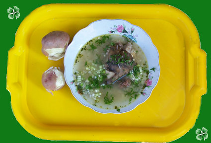 Caldo de Cabeza de tipo ocrosino.